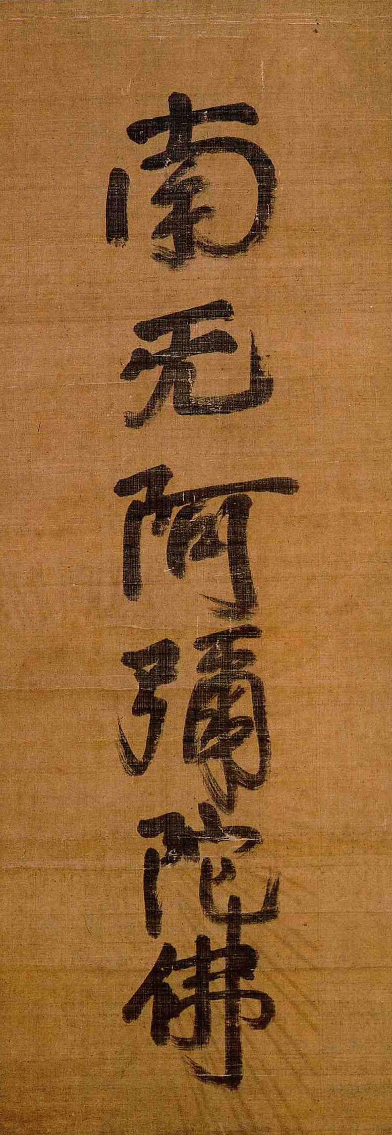 六字名号（光名号）